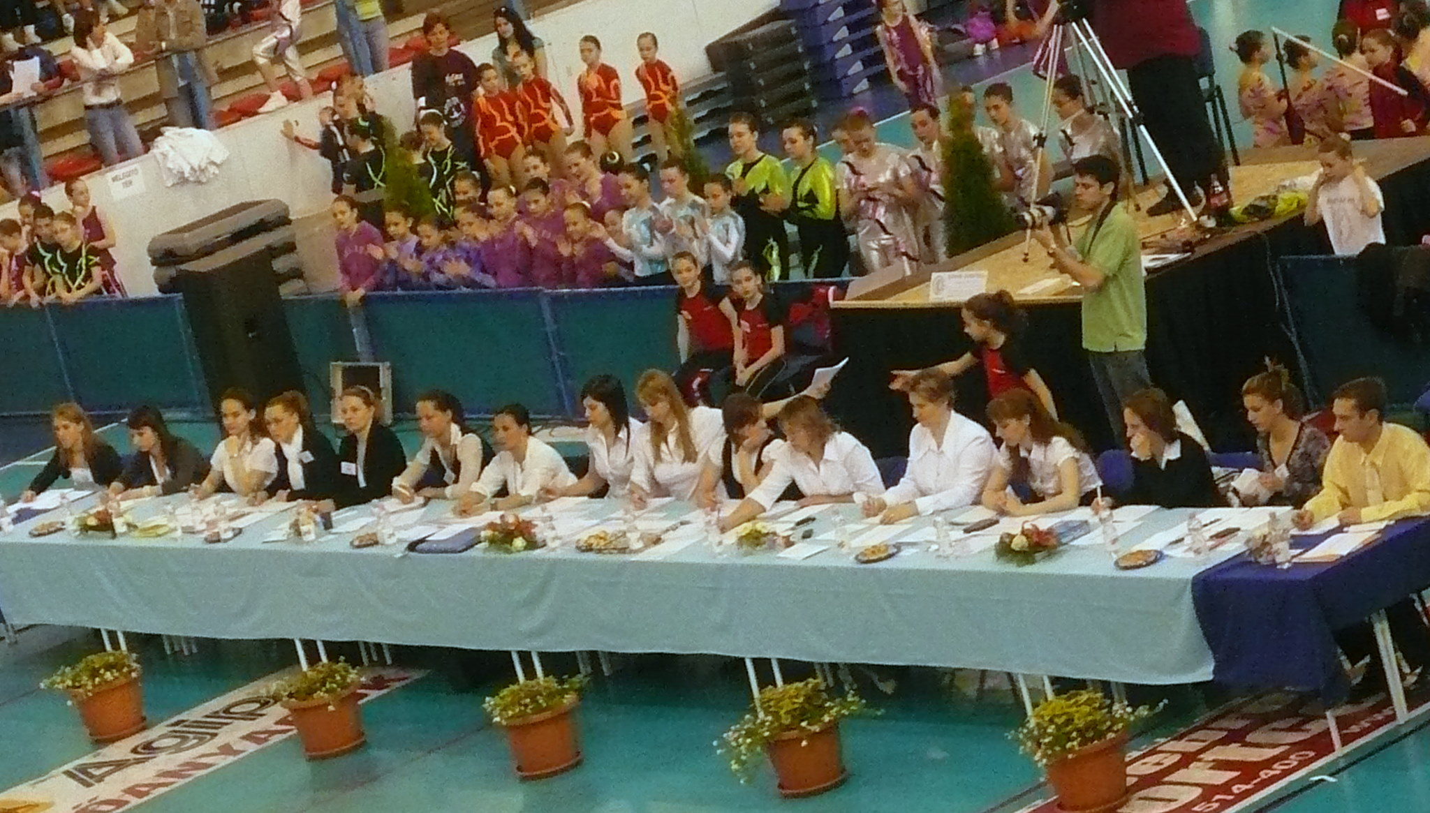 Munkában Sportaerobic OB. zsűrije. Debrecen Hódos Imre rendezvénycsarnok